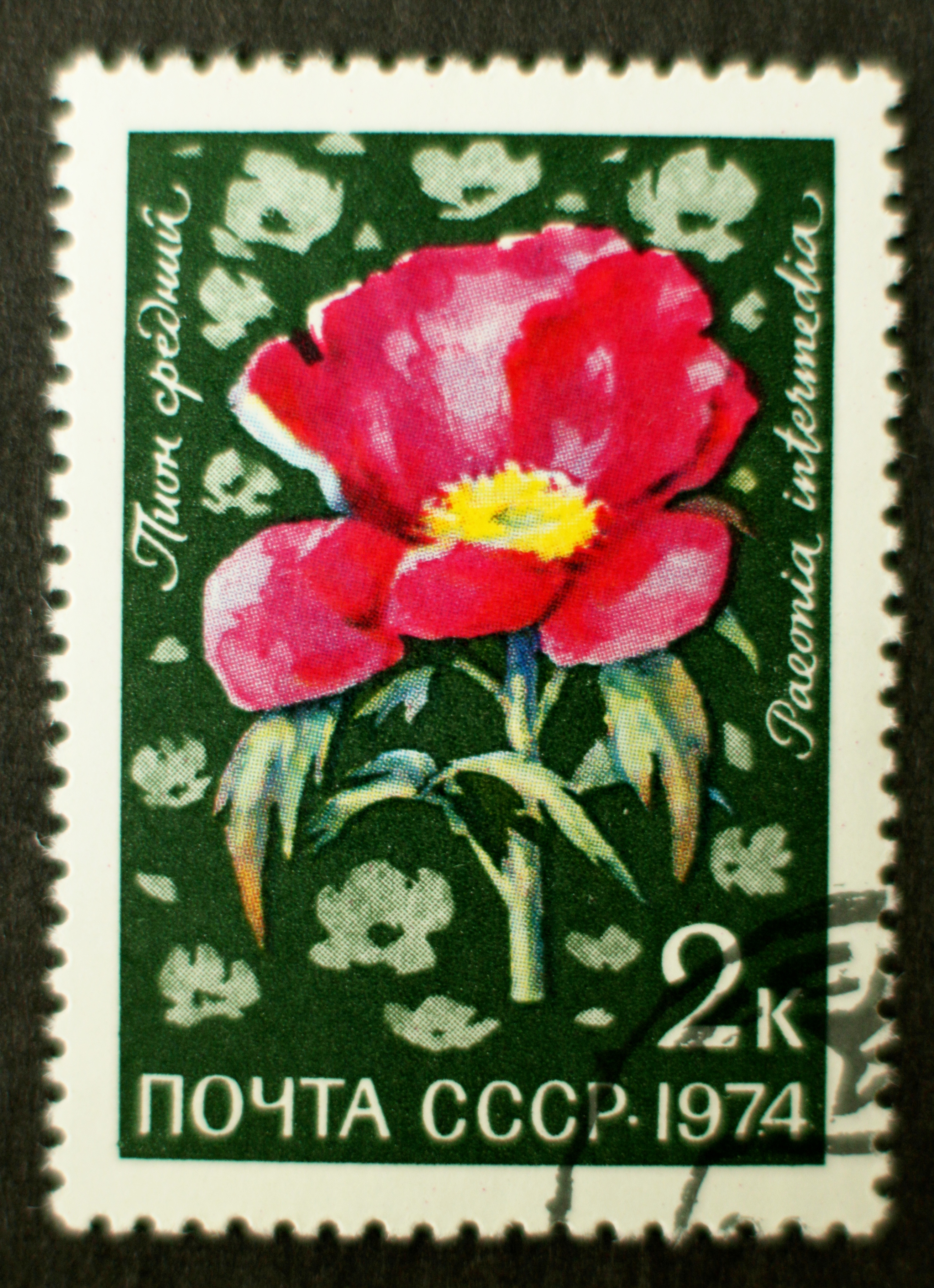 Briefmarke, Sowjetunion